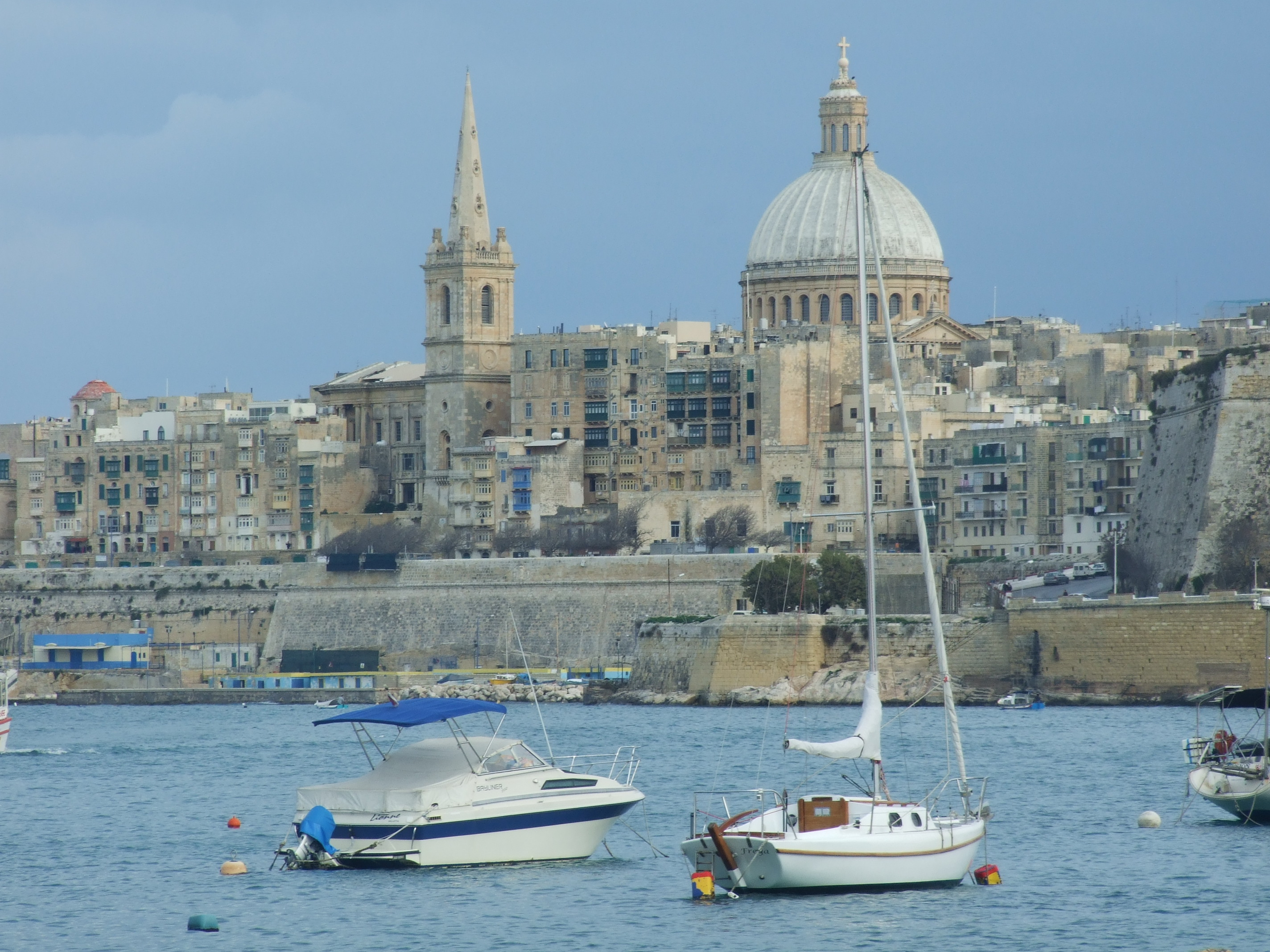 Foto de La Valeta (Malta).